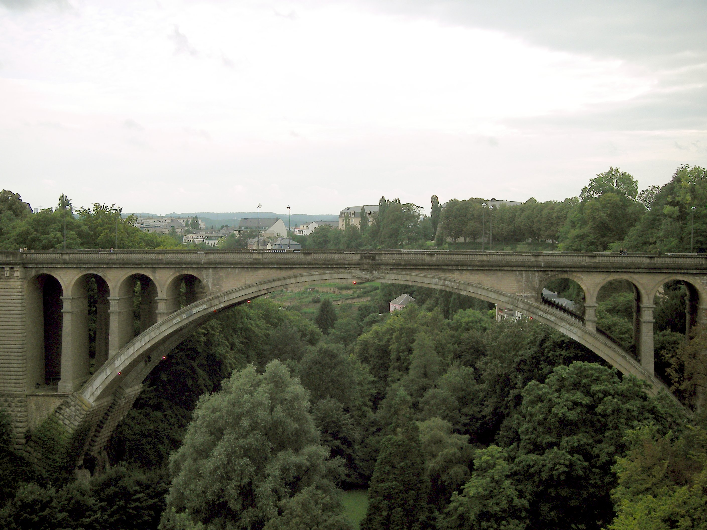 De Adolfsbrug in Luxemburg-stad werd gebouwd tussen 1889 en 1904 (ingehuldigd in 1903) en is vernoemd naar graaf Adolf (1817 - 1905), groothertog van Luxemburg. Bij haar voltooiing was dit bouwwerk met een lengte van 153 meter 's werelds grootste stenen boogbrug en een onofficiële nationaal symbool voor het groothertogdom Luxemburg. Ze overspant de vallei van de Pétrusse (Péitruss) en verbindt de wijk Gare met het stadscentrum.Het concept is ten dele van de ingenieur Paul Séjourné en is opgetroken in metselwerk, gehouwen steen en gewapend beton.Eind 2014 werd begonnen met herstelwerdzaamheden en dit tot 2017.